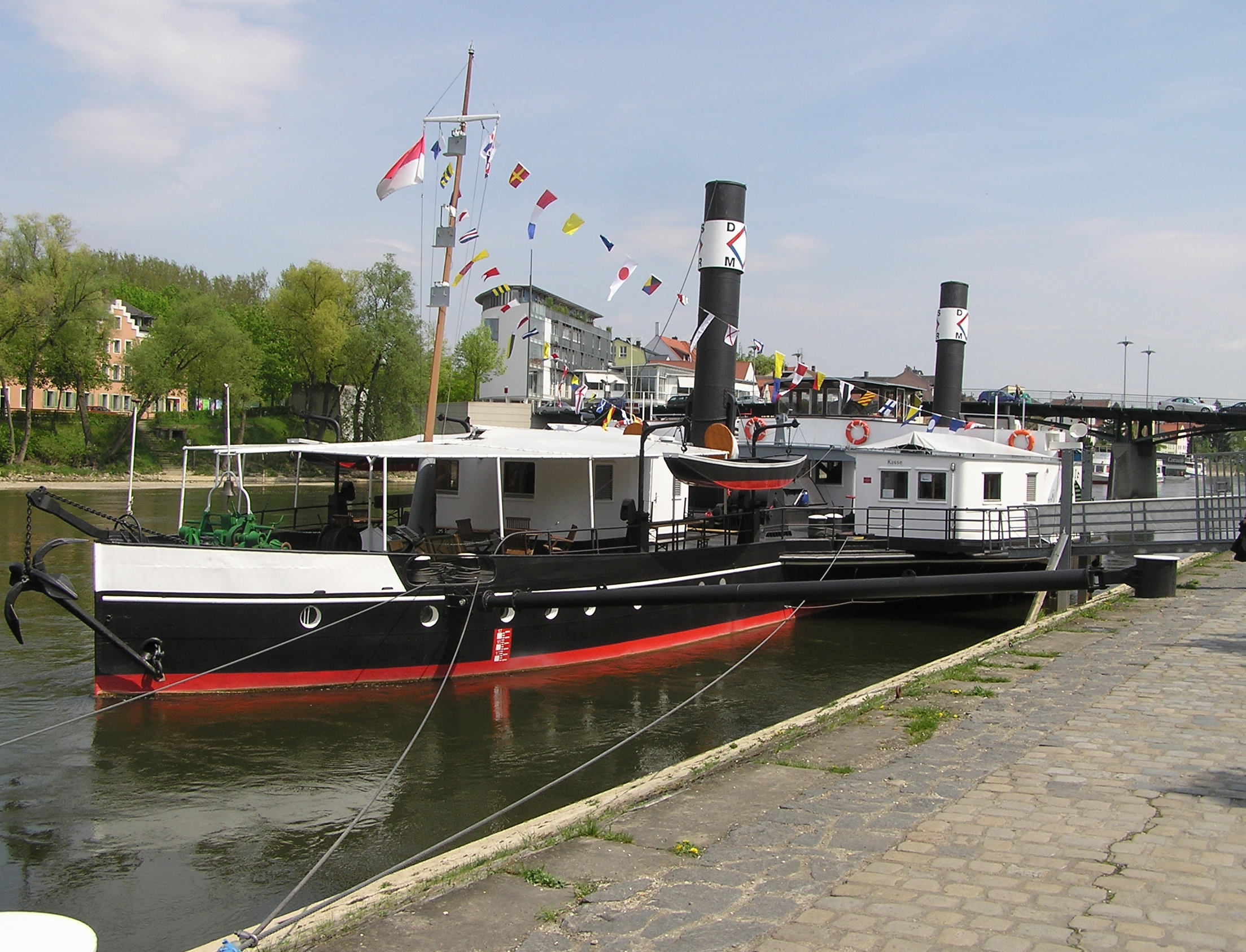 Das Bug der „Ruthof / Érsekcsanád“ des Donau-Schifffahrtmuseums Regensburg